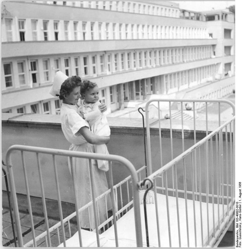 Dresden, Medizinische Akademie, chirurgische Klinik Zentralbild Quasch. 1.8.1956 Chirurgische Klinik der medizinischen Akademie in Dresden. Am 15. Februar 1956 wurde nach einer Bauzeit von zwei Jahren die chirurgische Klinik der medizinischen Akademie in Dresden-Johannstadt eröffnet. Sie ist nach den modernsten Gesichtspunkten erbaut und eingerichtet, trotzdem man sich beim Bau an die vorhandenen Grundrisse eines ausgebombten Gebäudes richten mußte. Sie verdankt ihre allen Erfordernissen entsprechende Gestaltung der lange vorhergehenden Planung (5 - 6 Jahre) und einer systematischen Zusammenarbeit zwischen Architekten und Ärztekollektiv. Die Klinik wurde mit einem Kostenaufwand von ca. sieben Millionen DM errichtet, einschliesslich aller Importe für die Einrichtung. Sie hat eine Kapazität von 325 (drei zwei fünf) Betten und nimmt nur chirurgische Fälle auf. Die Patienten kommen vor allen Dingen aus den Bezirken Dresden und Karl-Marx-Stadt. Spezialfälle kommen aus der gesamten DDR nach Dresden. Spezialgebiete der Klinik sind die Thorax-, Neuro-, Unfall- und Kinderchirurgie. Auf diesen Gebieten wird nicht nur die Heilbehandlung durchgeführt, sondern auch wissenschaftliche Forschung betrieben. UBz: Wenn das Wetter schön ist, dann werden die Krankenbetten der kleinen Patienten auf den Balkon gestellt. Schwester Gisela Müller betreut liebevoll den kleinen Holger Franke, der mit Verbrühungen 2. und 3. Grades eingeliefert wurde. Im Hintergrund die Kinderklinik Johannstadt.